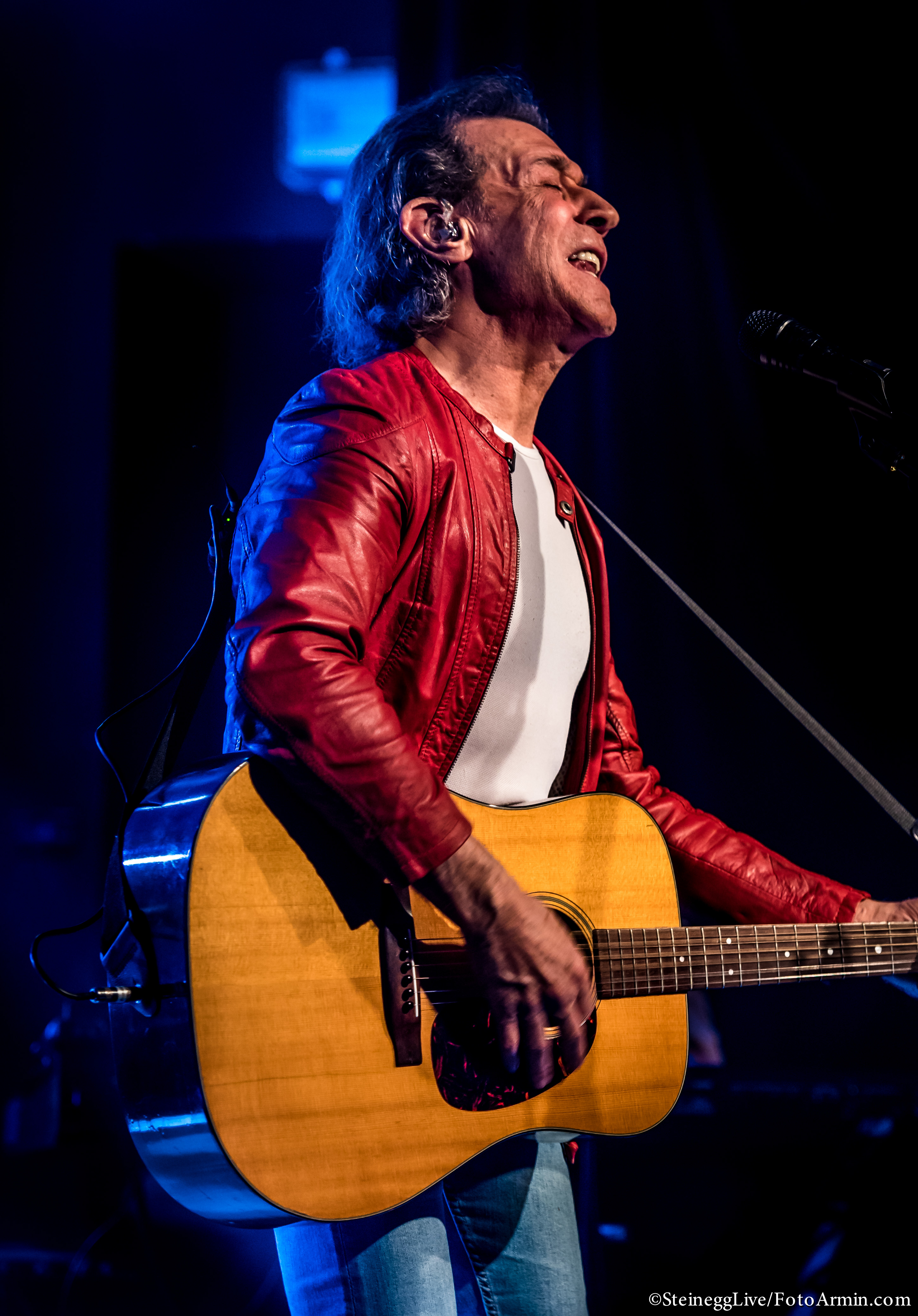 Albert Hammond bei seinem Italien-Konzert 2017 - Steinegg Live Festival